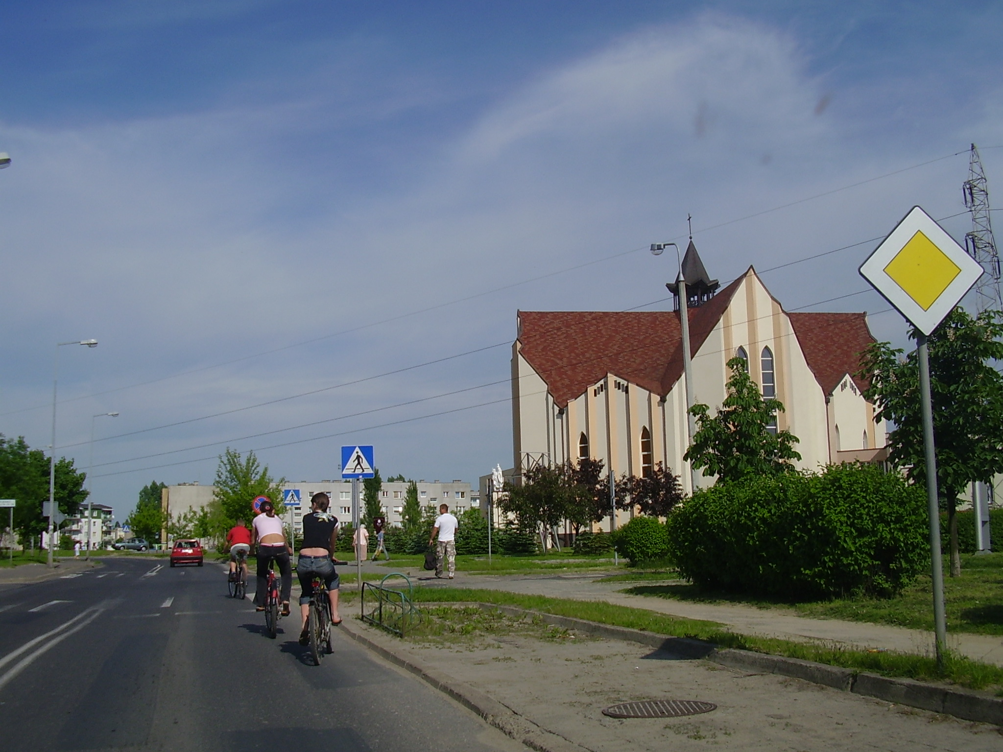 Kościół św. Piotra i Pawła na Dobrzecu (Kalisz)